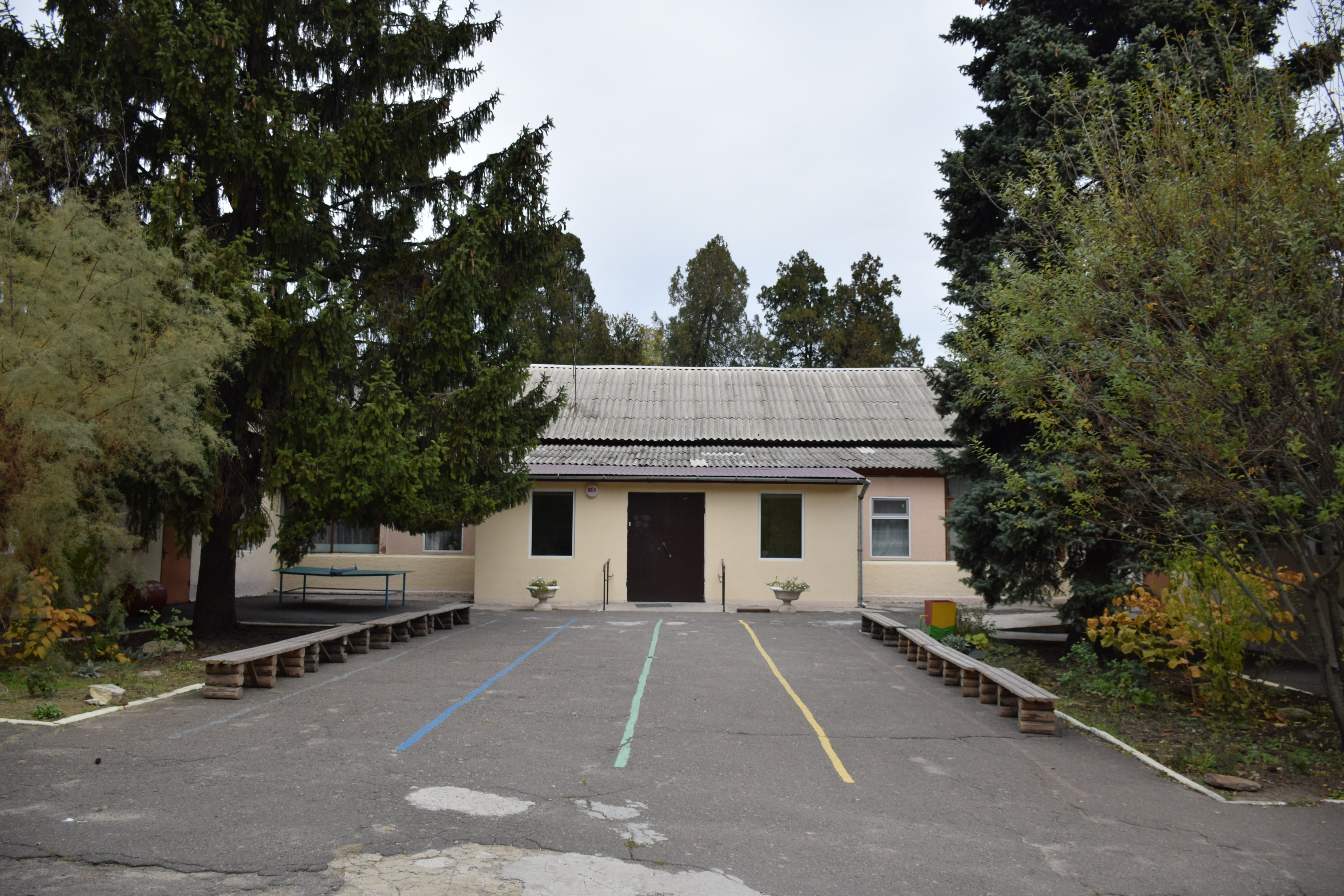 Парк дитячого санаторію «Хаджибей», Біляївський район, с. Холодна Балка, вул. Санаторна, 1, дитячий санаторій «Хаджибей»